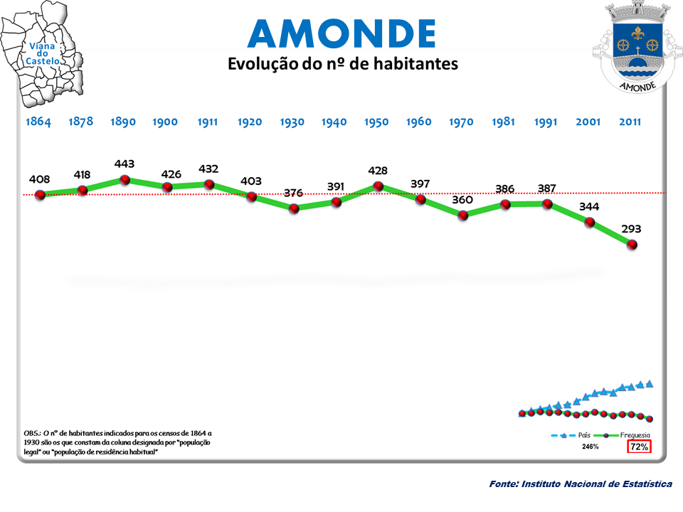 Censos 1864/2011